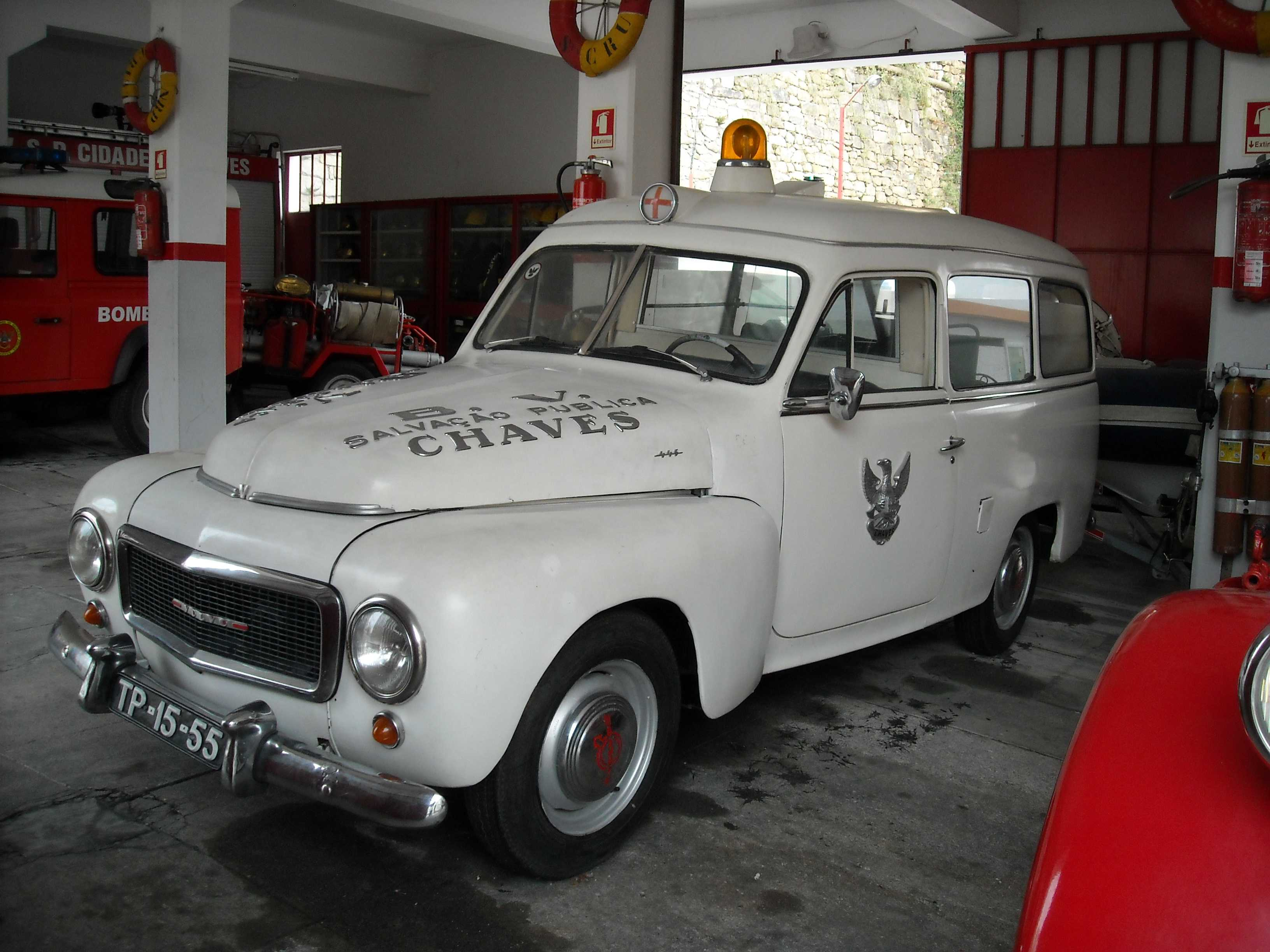 Chaves, Portugal, noviembre 2008 Chaves, Portugal, noviembre 2008